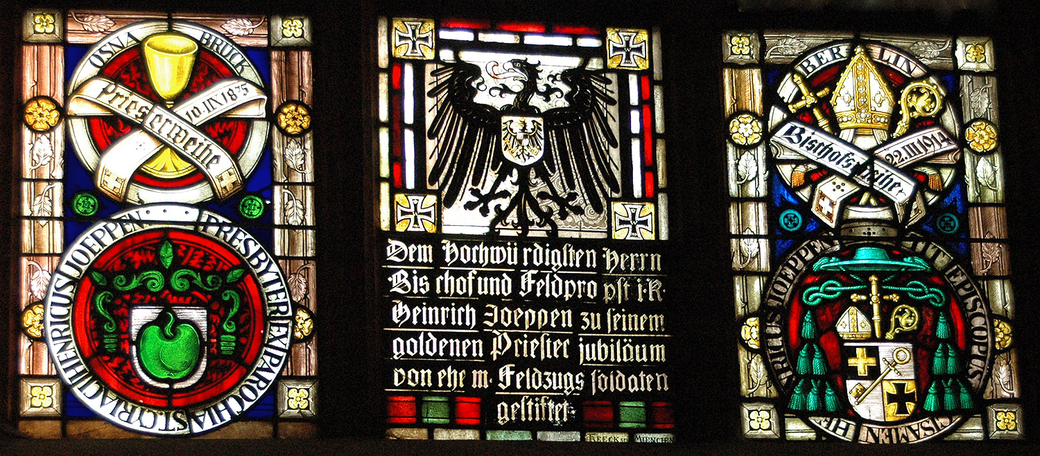 Ausschnitt aus einem Kirchenfenster in der Pfarrkirche von Hüls, zu Ehren Joeppens goldenem Priesterjubiläum im Jahr 1925 gestiftet.